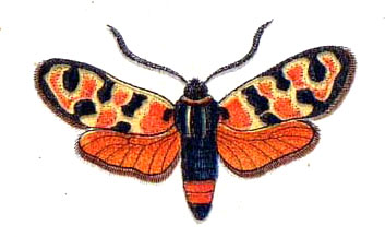 Zygaena fausta (Linnaeus, 1767)